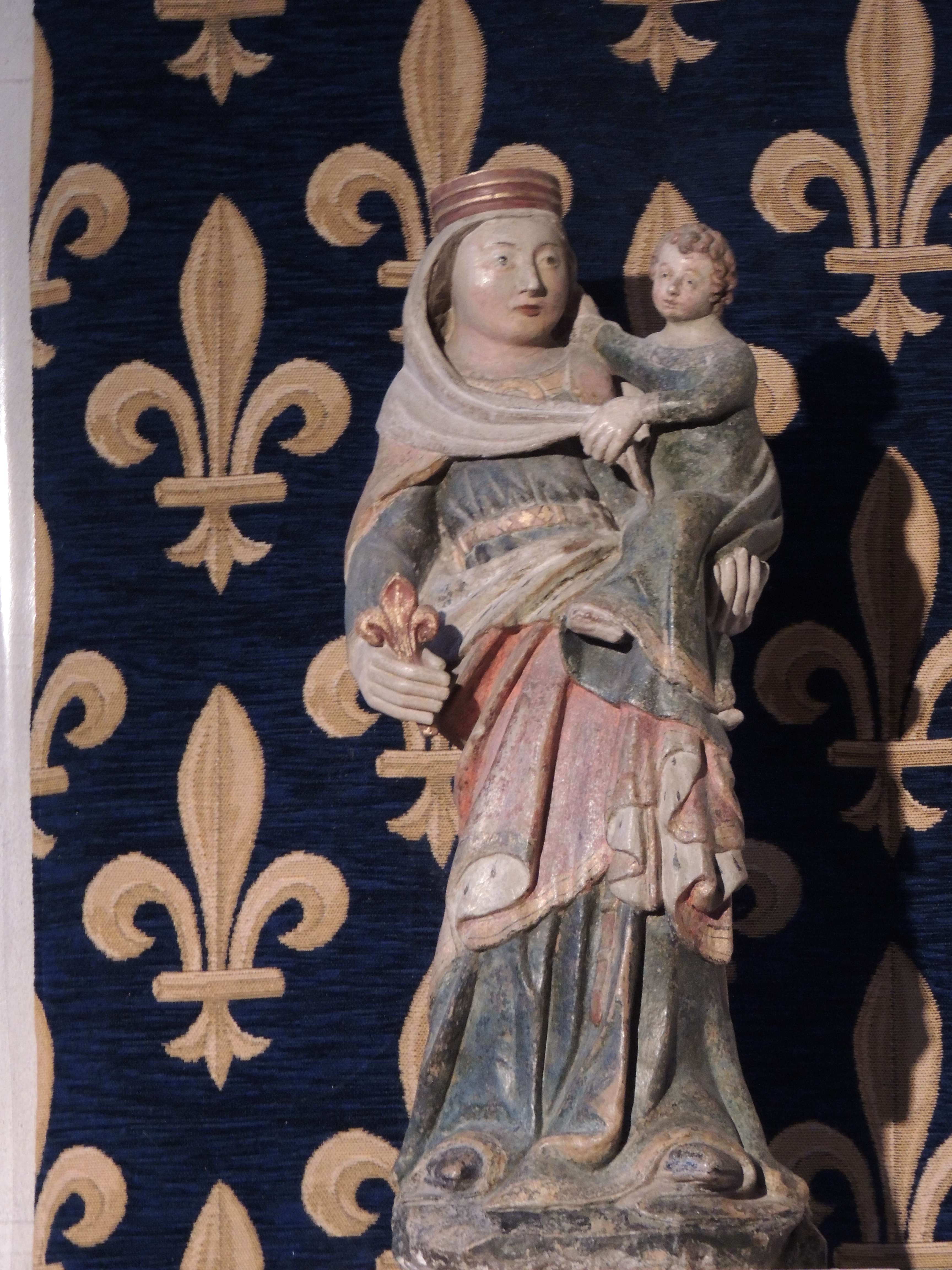 La statue de Notre-Dame-du-Chef-du-Pont, dans l'église Saint-Thomas de La Flèche